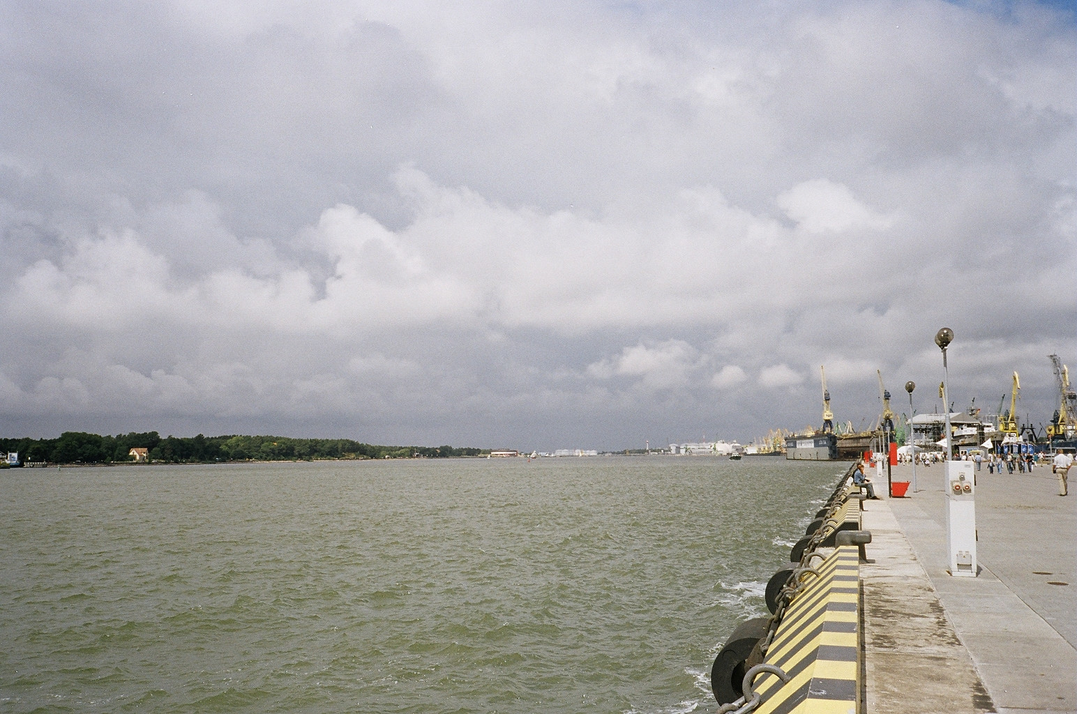 Klaipėdos uostas žvelgiant nuo kruizinių laivų prieplaukos